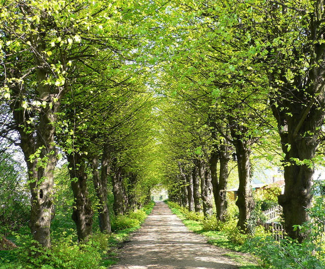 Zufahrtsallee (Lindenallee) zum Haus Kaldenhausen